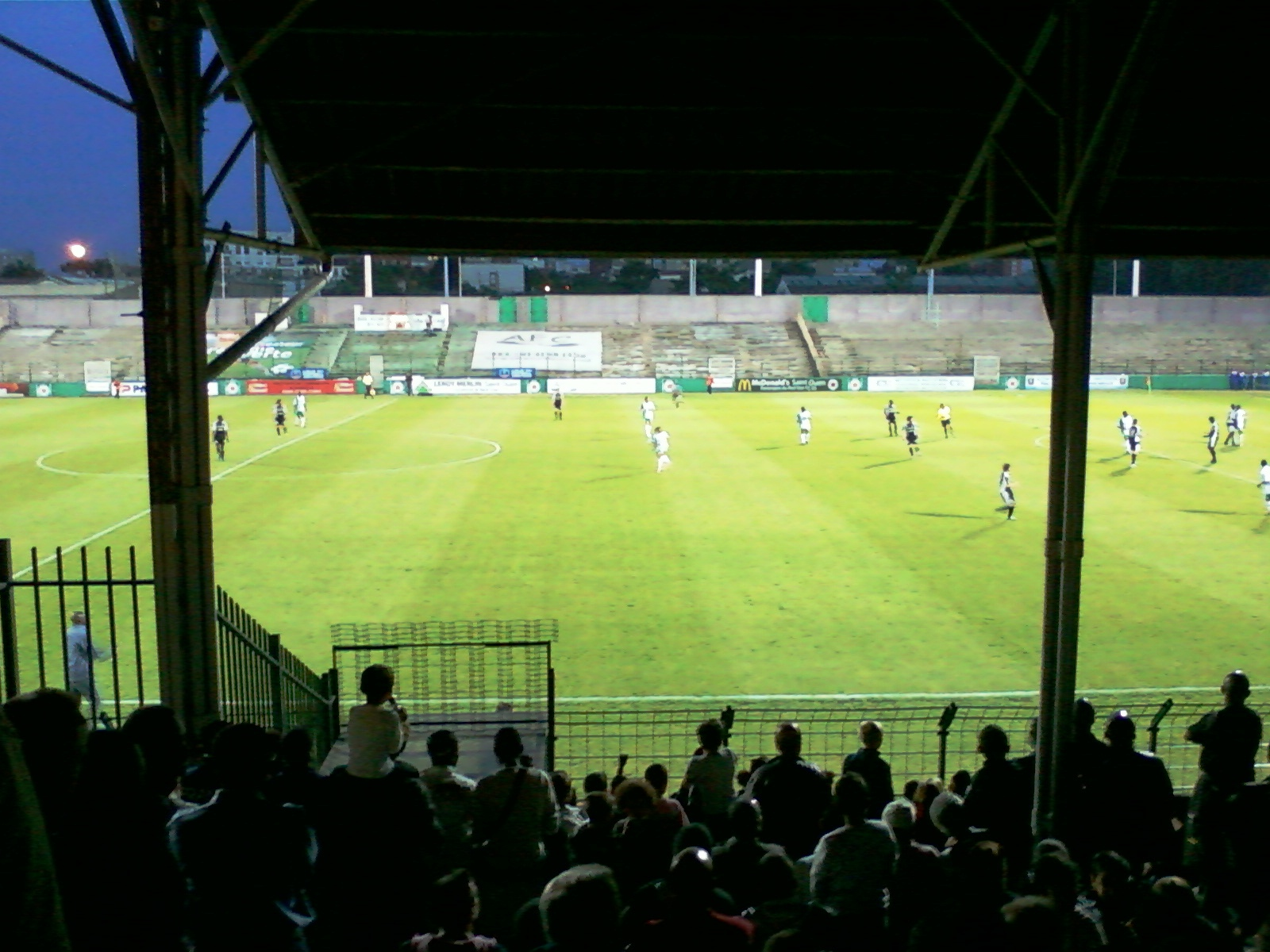 Vue d'ensemble du stade lors du match Red Star - CA Bastia du 13 mai 2011